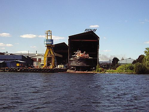 ASENAV in Valdivia